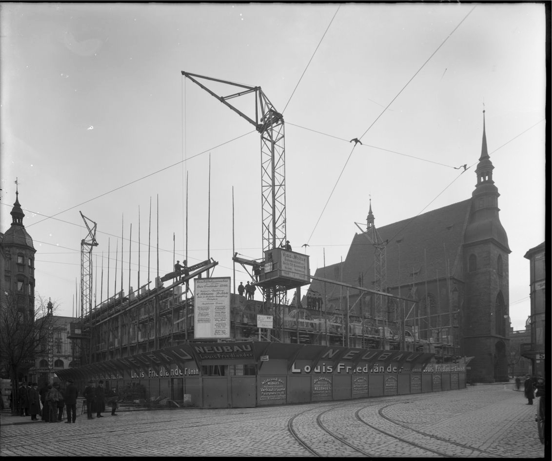 Görlitz - Bau des Kaufhauses Louis Friedländer, Frauenkirche, 1912 - Robert Scholz